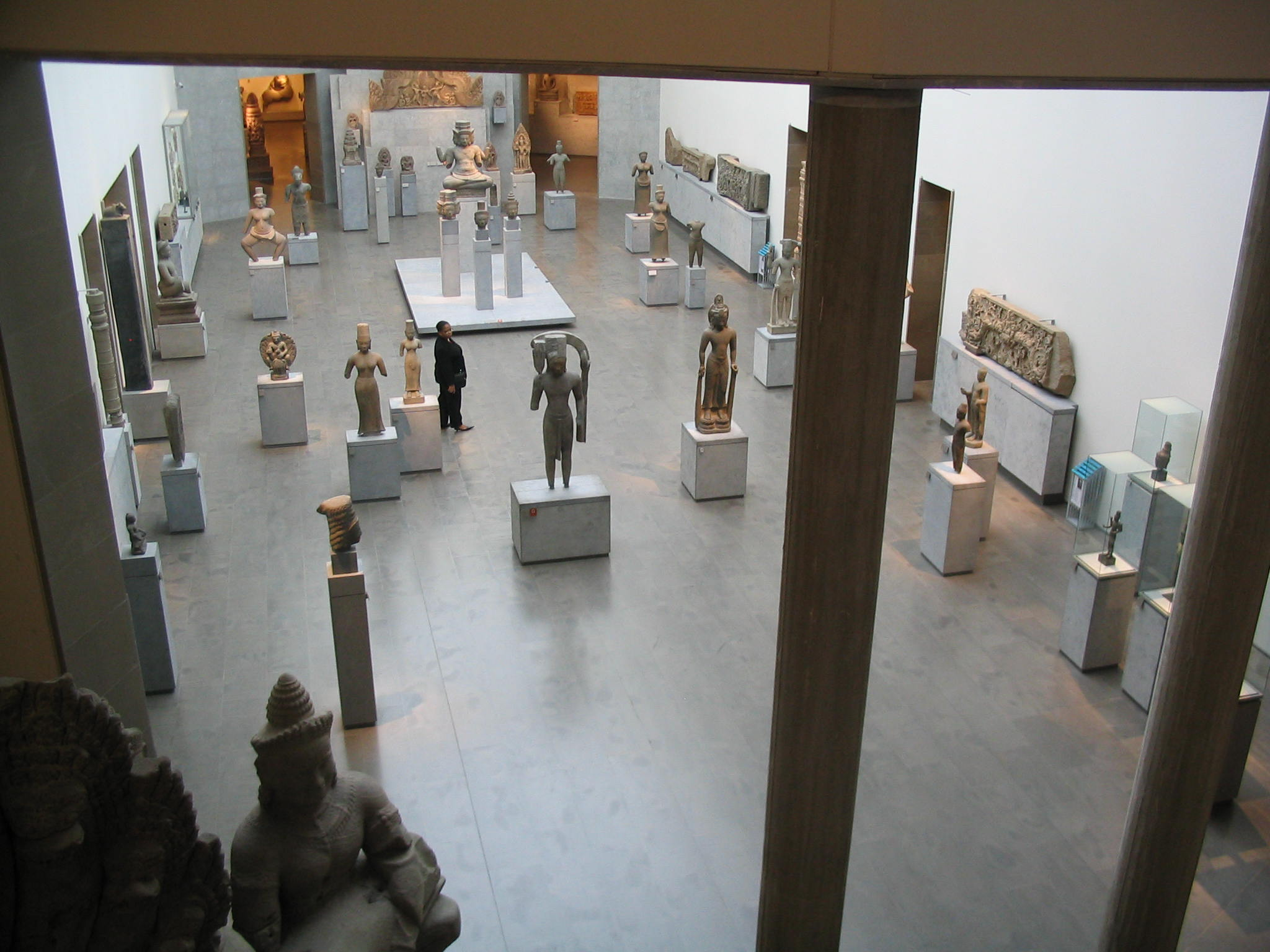 Vue du rez-de-chaussée du musée national des Arts asiatiques-Guimet (6, place d'Iéna - 75016 Paris). Photographie personnelle réalisée en septembre 2006.